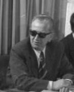 Portrait Ludwig Schnur (1973)